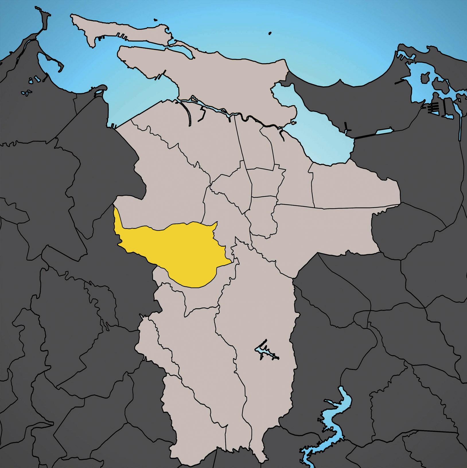 Monacillo Urbano Barrio Locator map